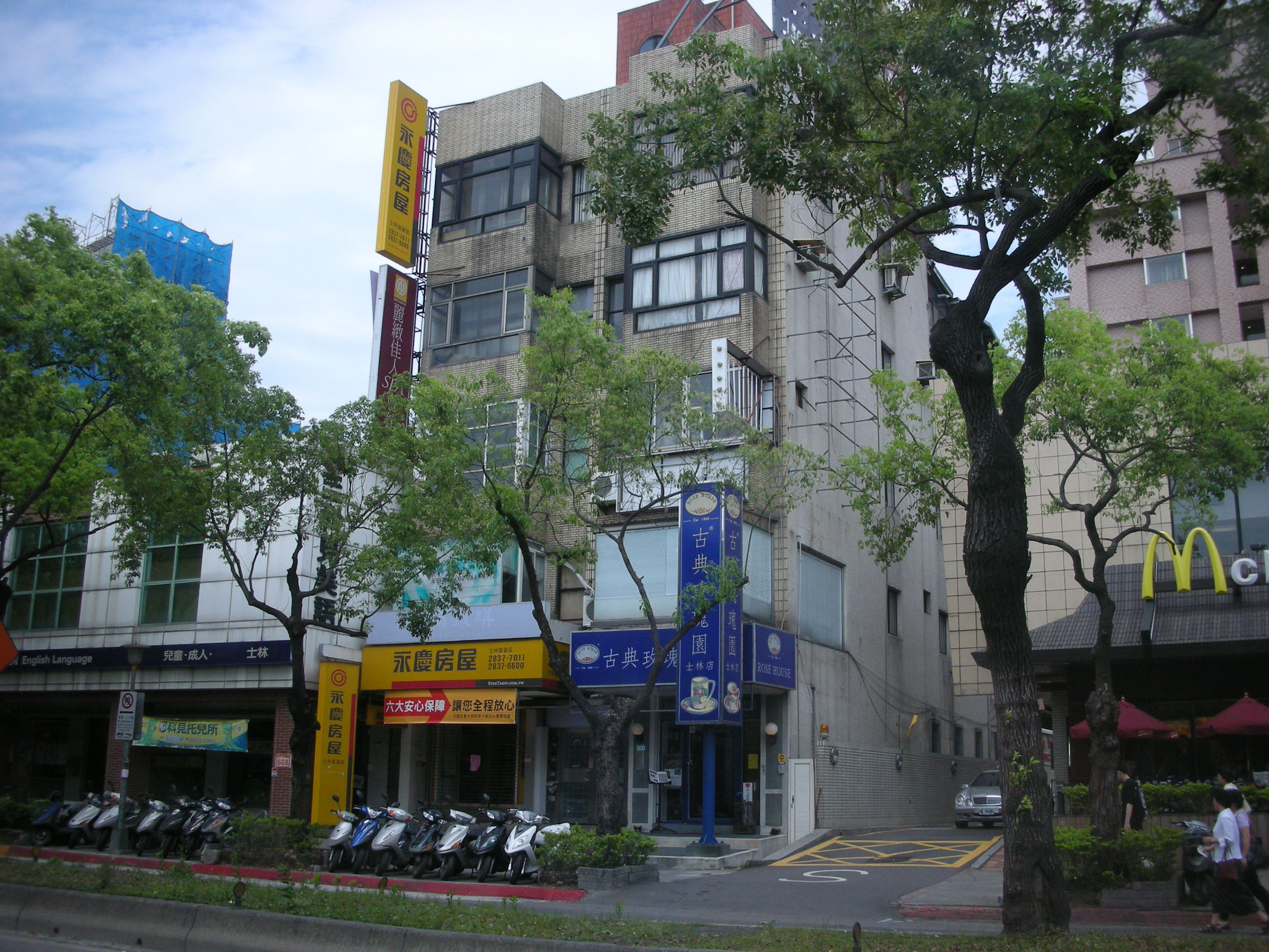 中文（台灣）: 臺北市士林區中山北路五段，永慶房屋士林直營店（中山北路五段606號）與古典玫瑰園士林店（中山北路五段604號）。